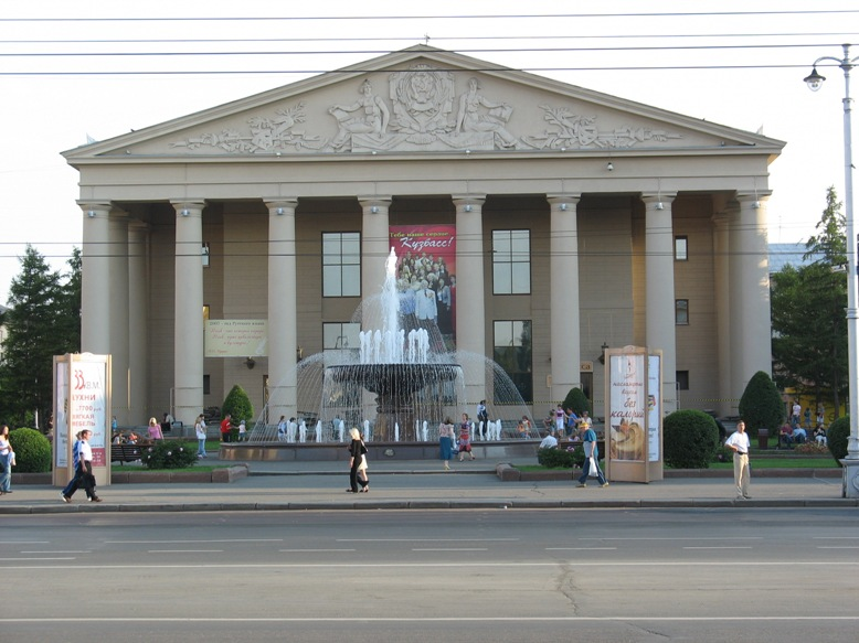 Драматический театр (Кемеровская область, Кемерово, Советский пр., 53)